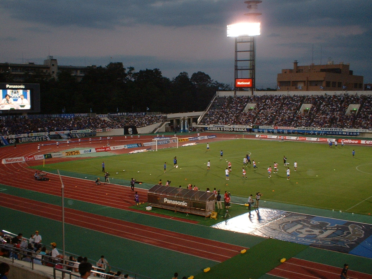 Osaka Expo 70 Stadium (1970年大阪万博スタジアム)